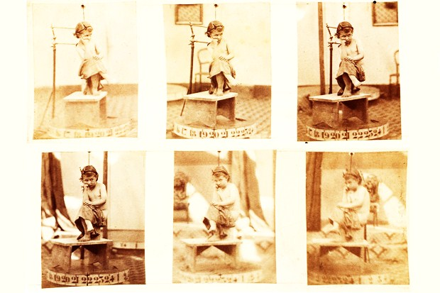 Serie de photos pour une photosculpture prise en 1865 par Willème.